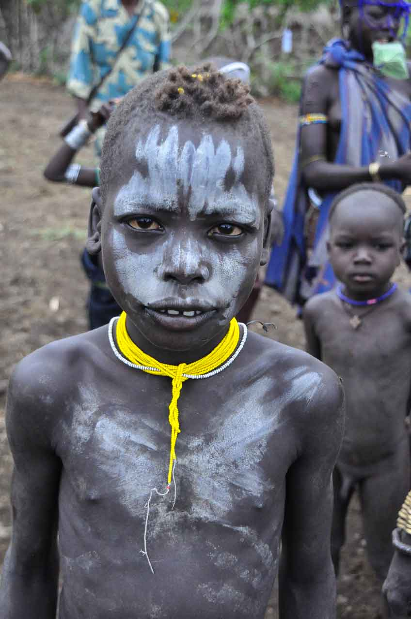 Omo Valley, Jinka